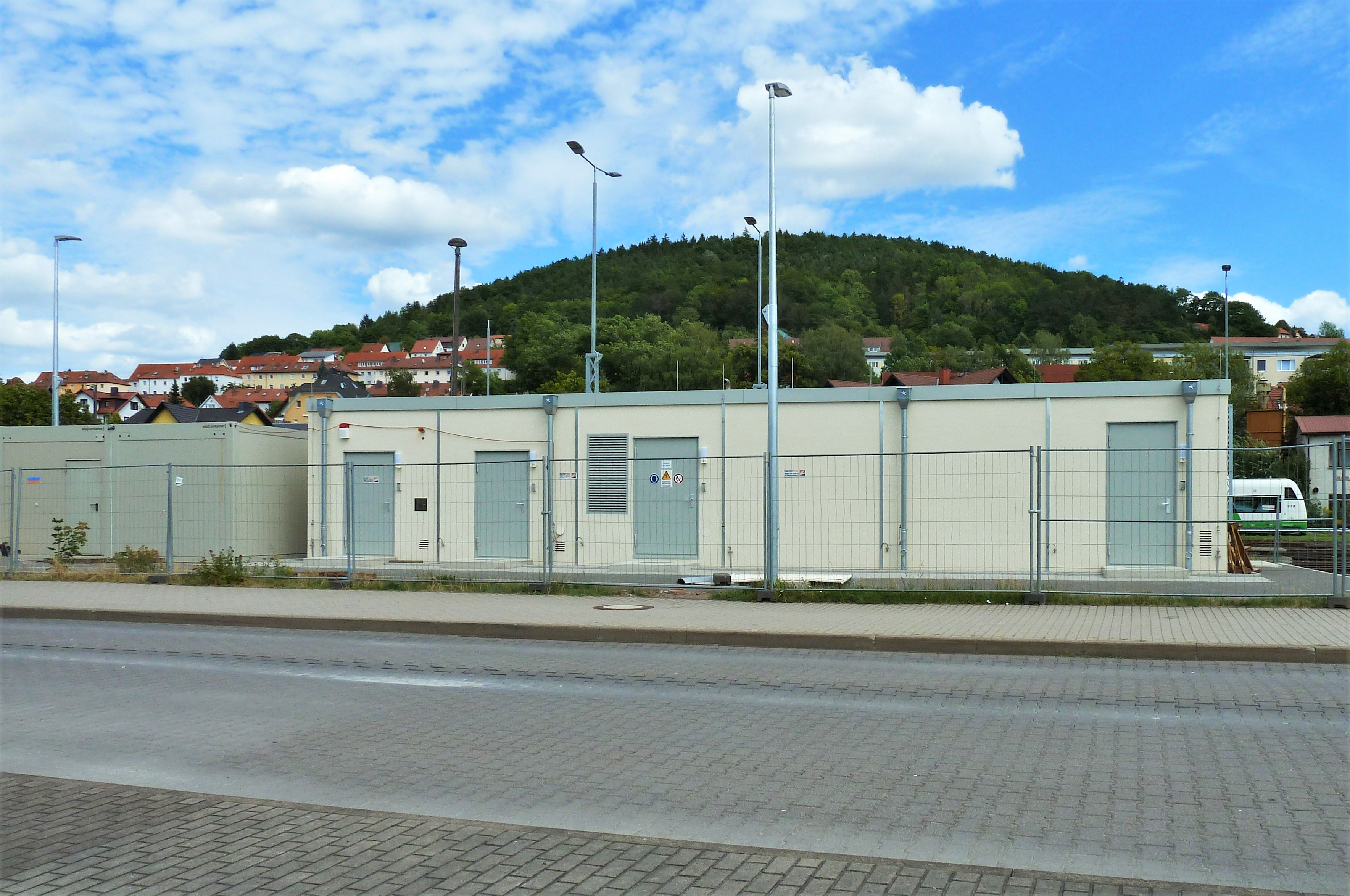 Das 2019 erbaute elektronische Stellwerk (ESTW) auf dem Bahnhof in Meiningen.